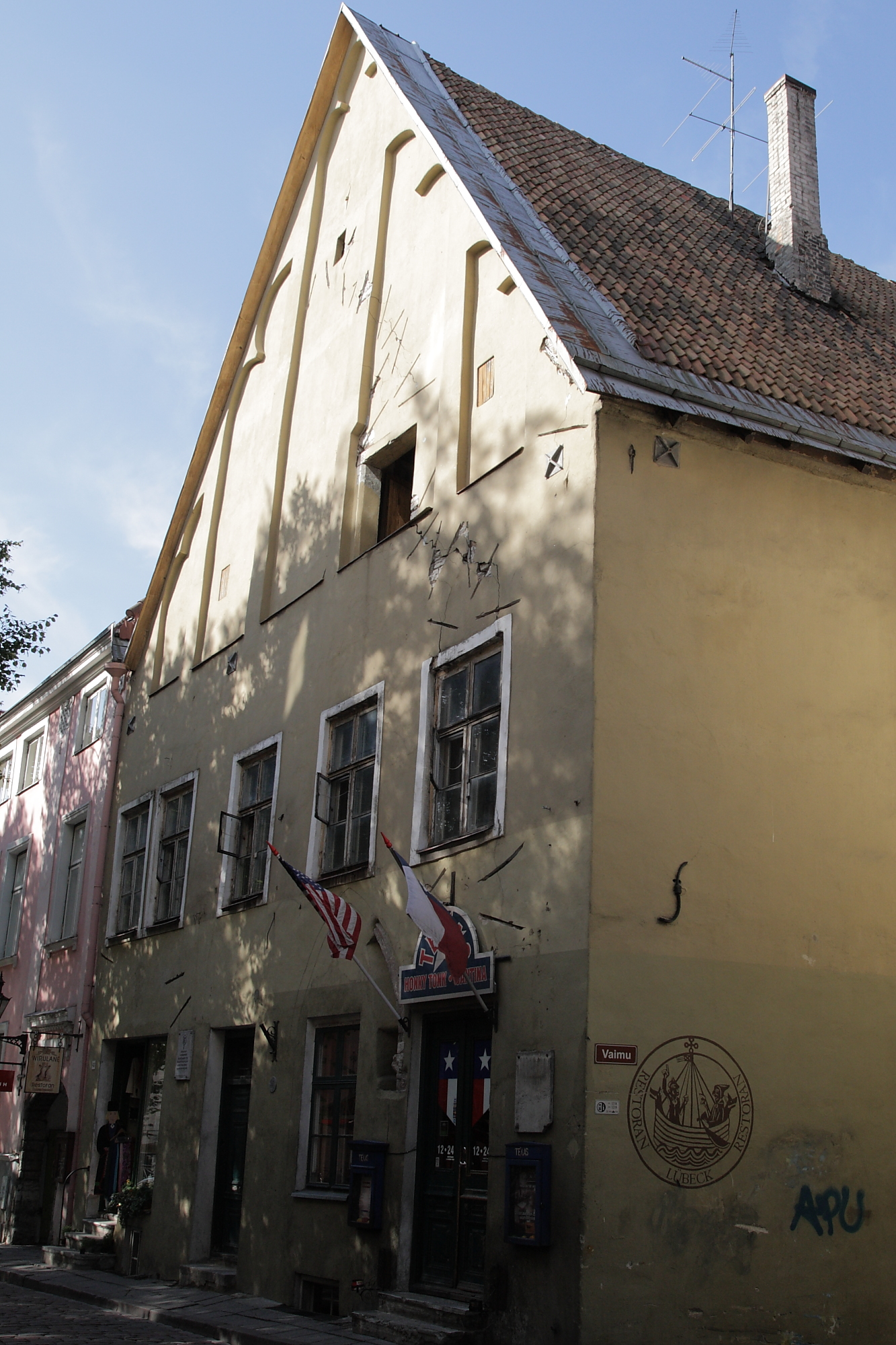 Tallinn, elamu Pikk 43, 14.saj., 15.-20.saj